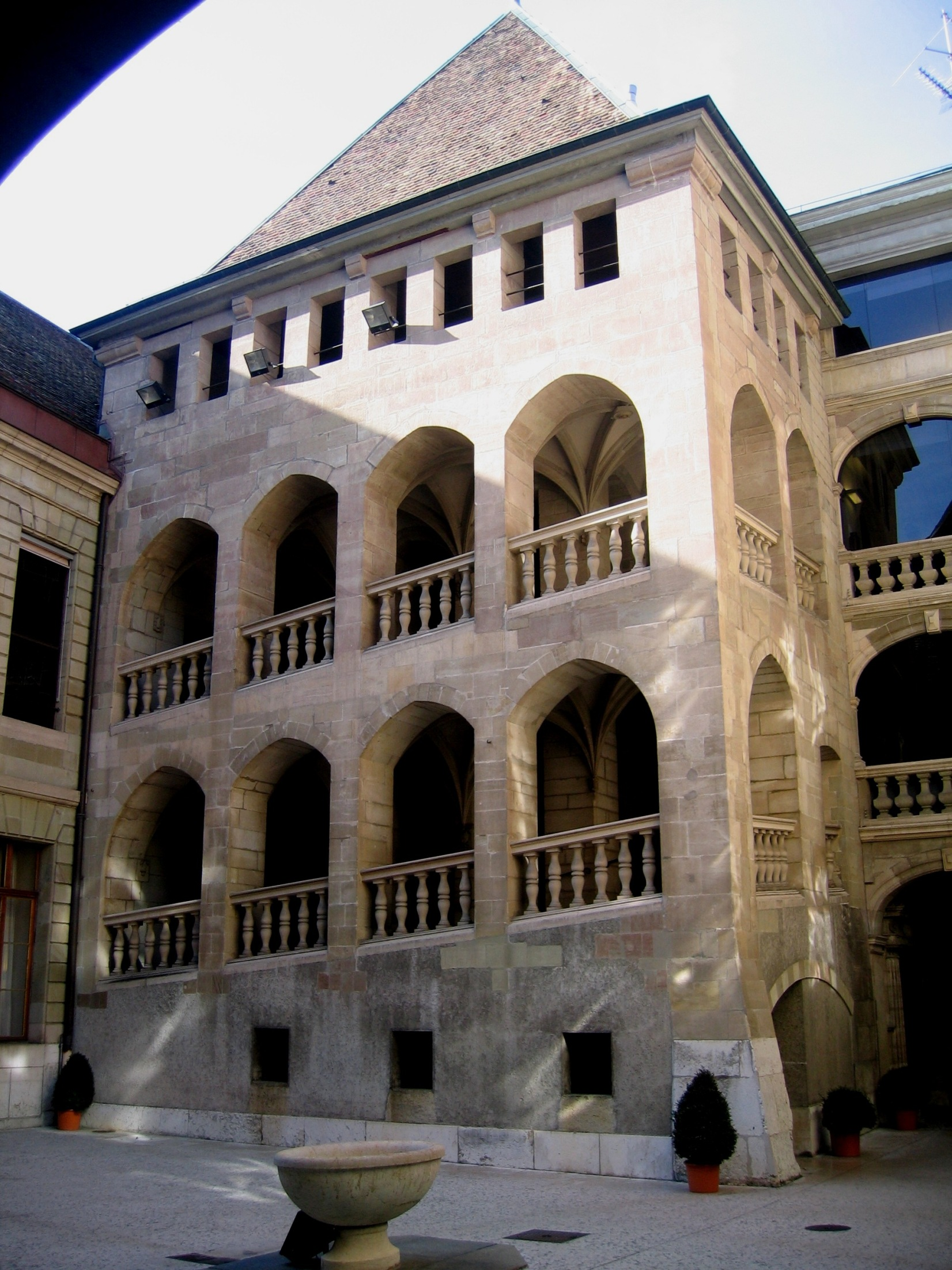 Suisse Geneve Hotel Ville